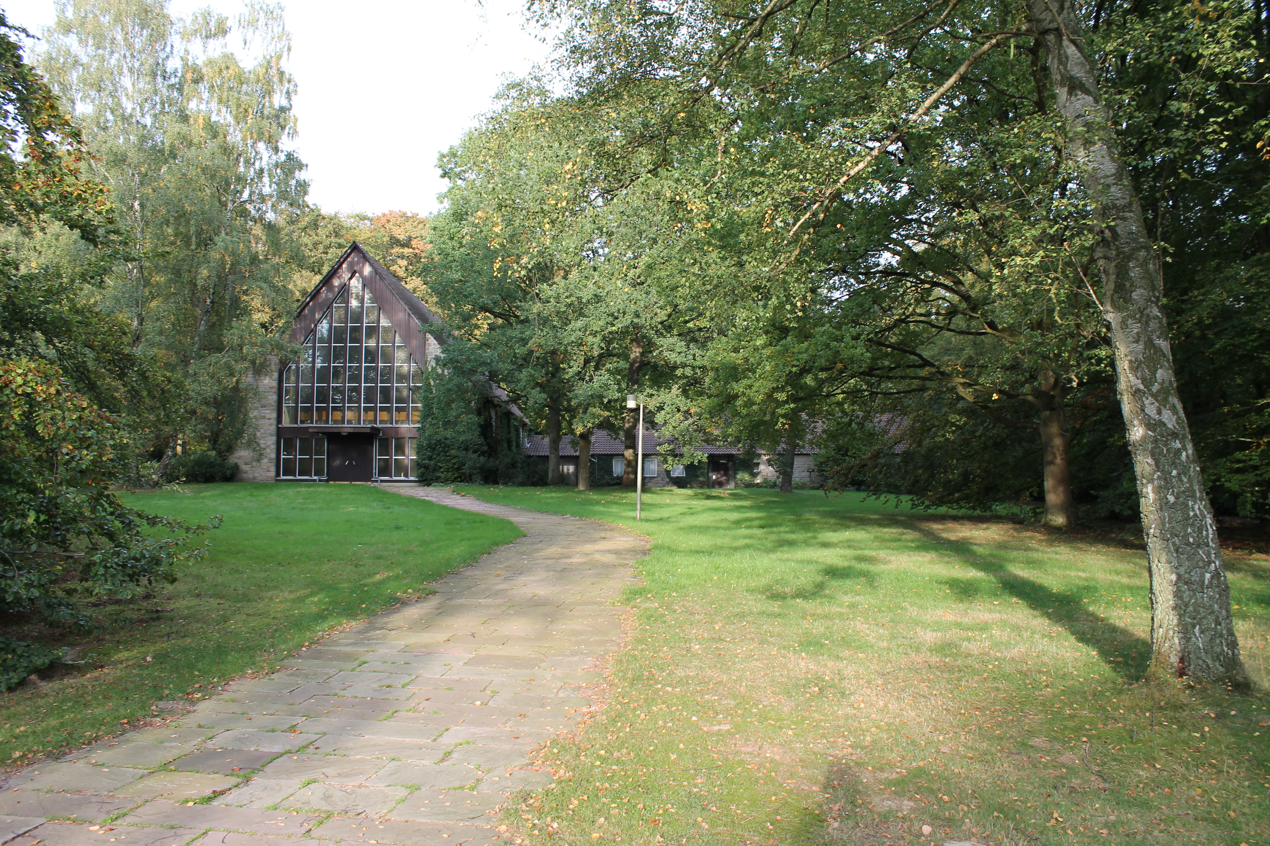 Herford, Baudenkmal 441, Kapelle